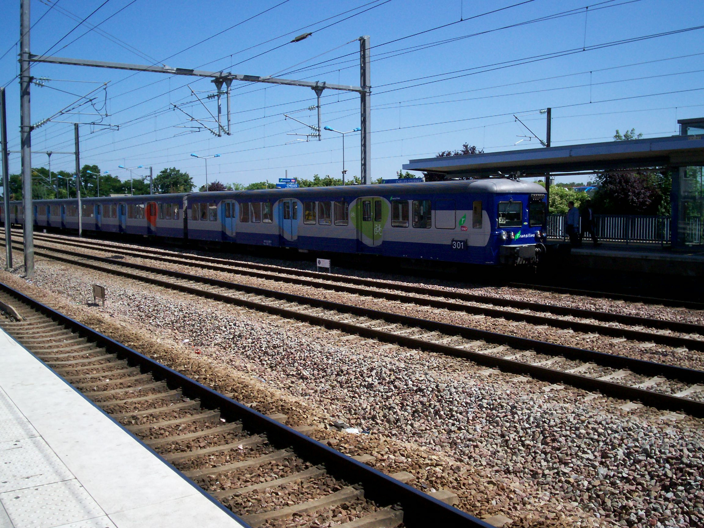 Train MICI assuré par une Rame Inox Banlieue rénovée Transilien